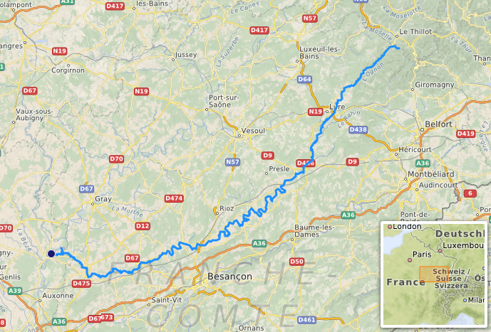 carte réalisée sur umap, [1] This map may be incomplete, and may contain errors. Don't rely solely on it for navigation.